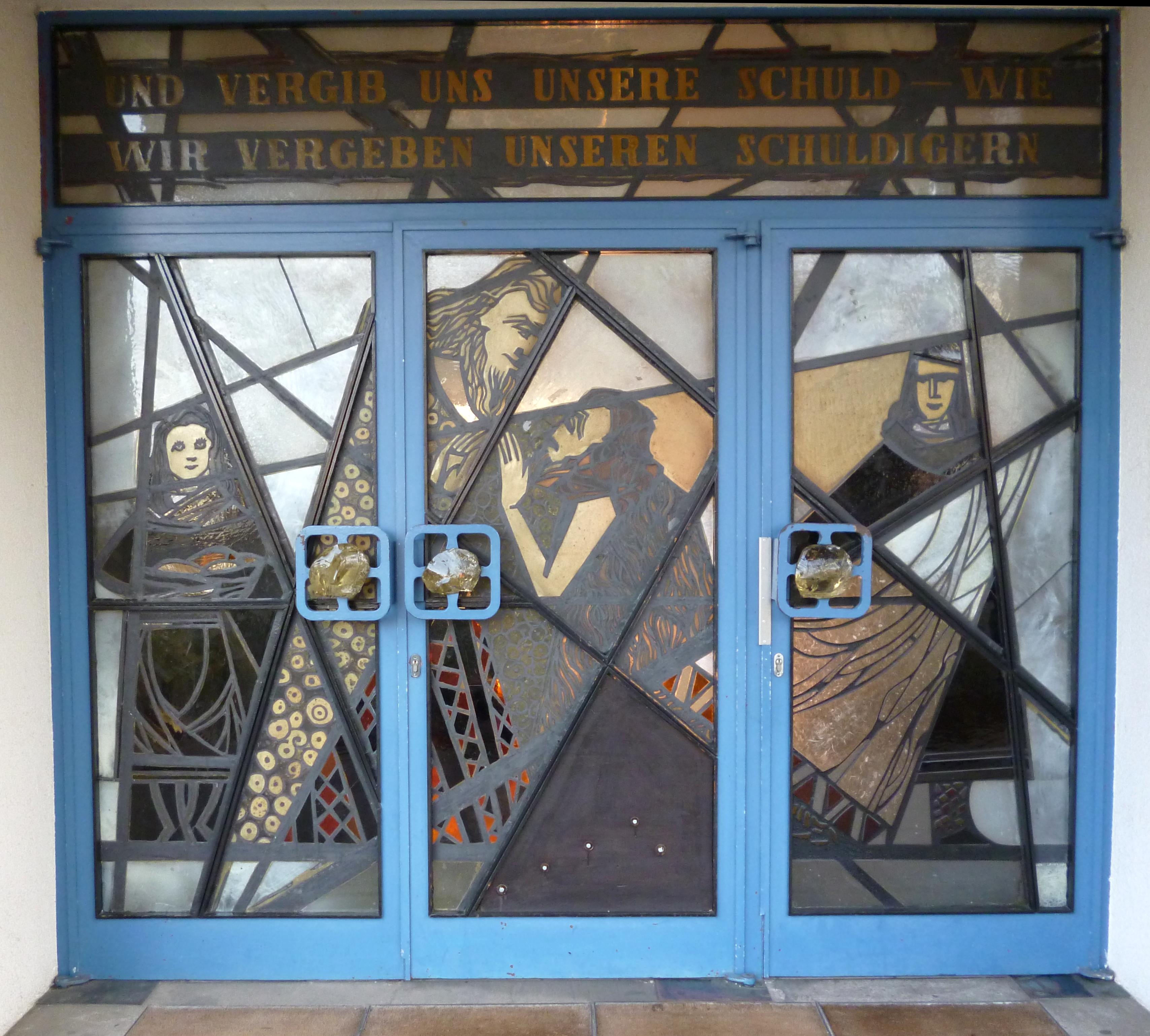 Evangelisch – Freikirchliche Gemeinde, Hauptstr. 127, Herne-Wanne. Fenster in der Eingangstür von Edmund Schuitz, ca. 1958, Antikglas/Blei/Schwarzlot/Klebetechnik. Motiv: Heimkehr des verlorenen Sohnes. Bildtext: UND VERGIB UNS UNSERE SCHULD WIE WIR VERGEBEN UNSEREN SCHULDIGERN.